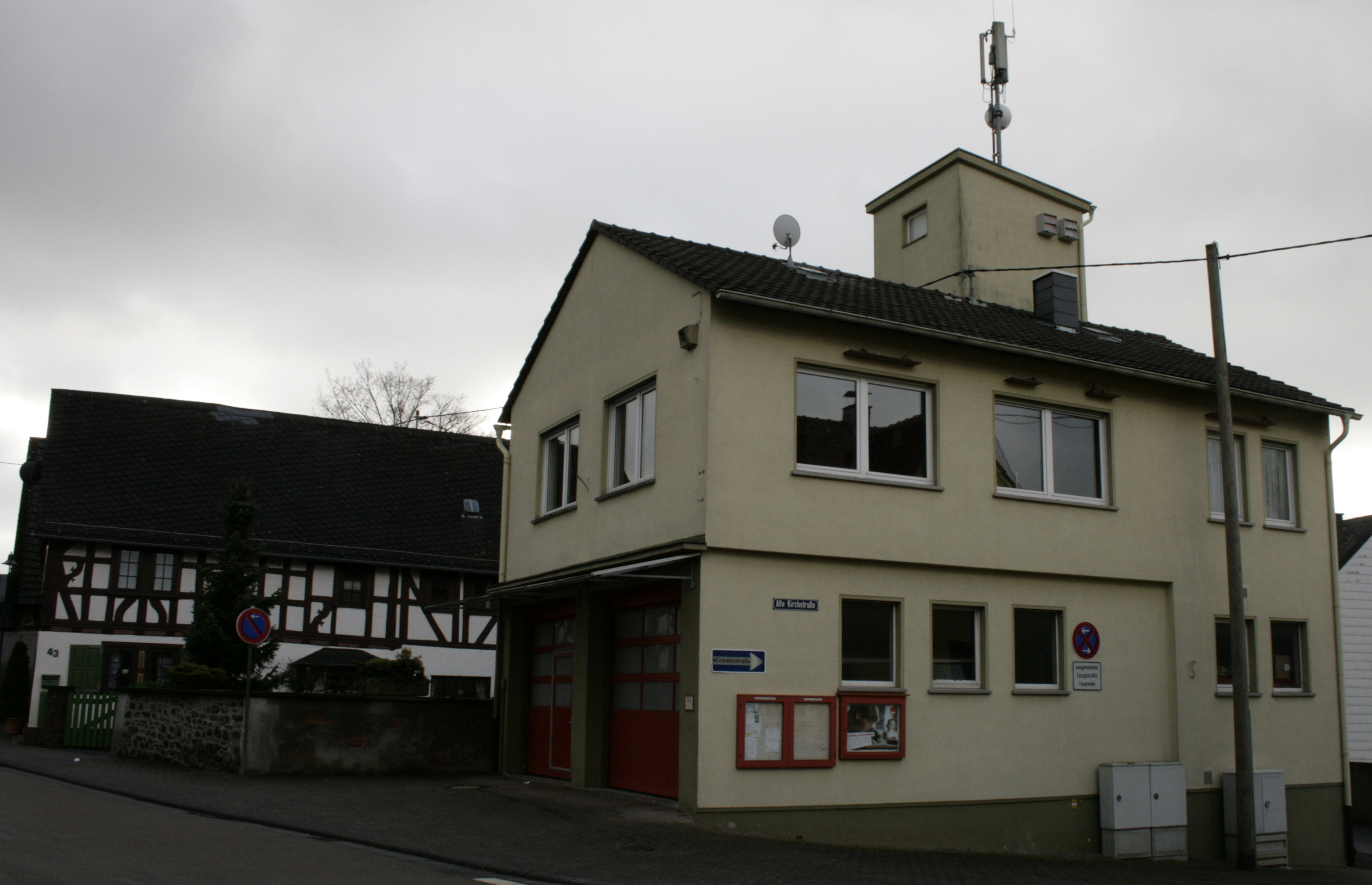 Ehemaliges Rathaus in Hadamar-Steinbach, Deutschland